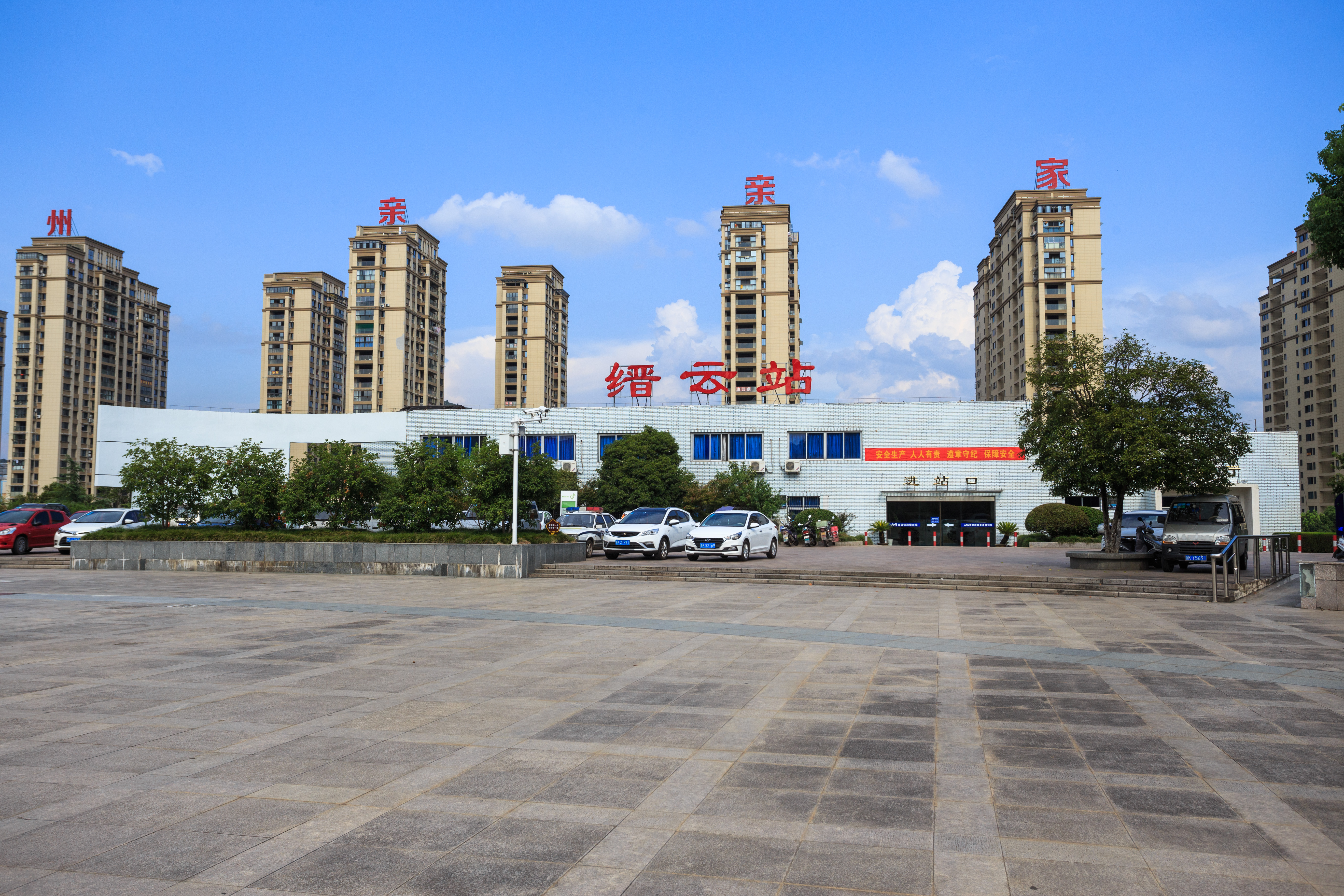 缙云站